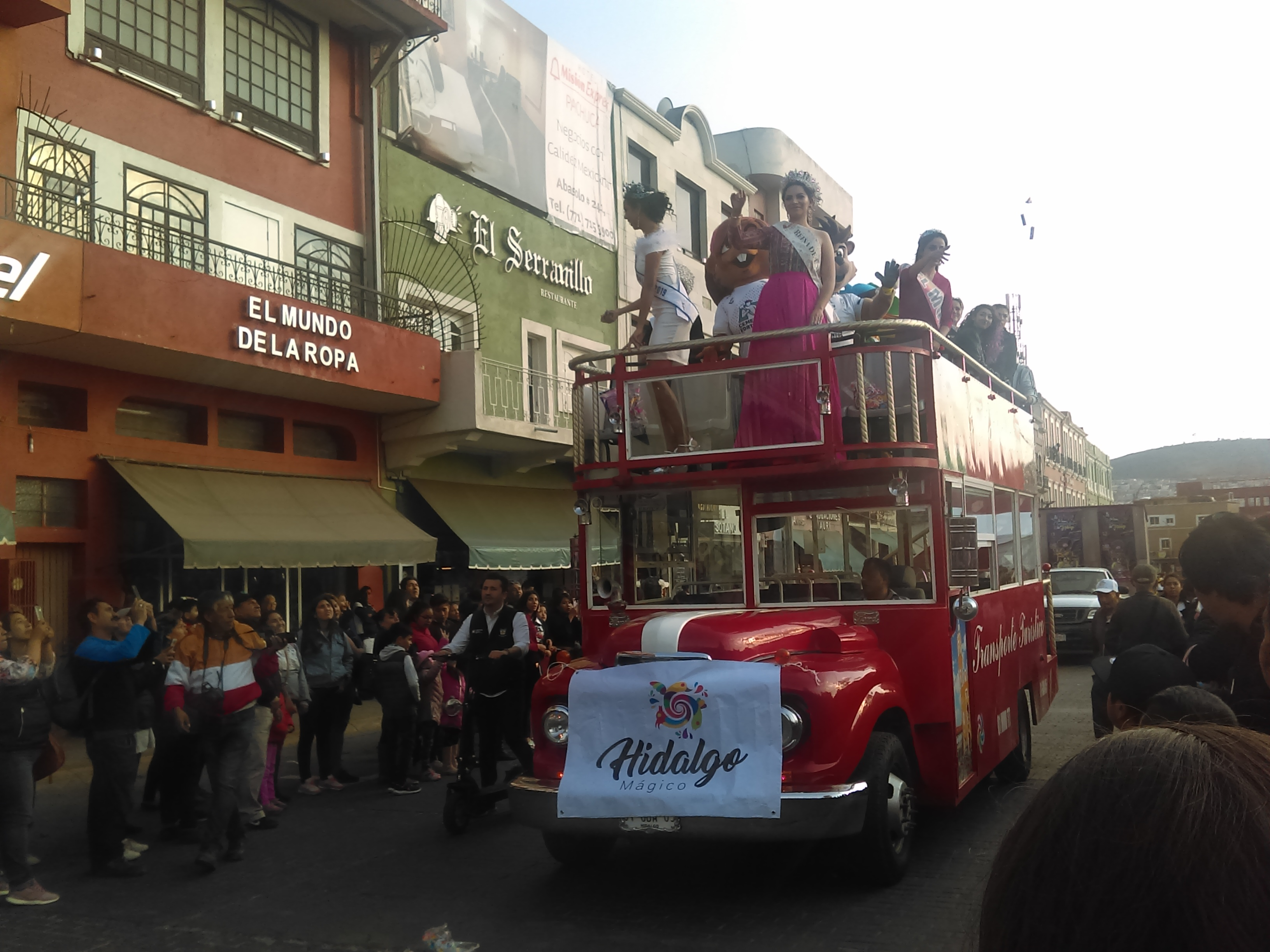 Desfile "Magia de los Carnavales de Hidalgo" en Pachuca de Soto (2020).